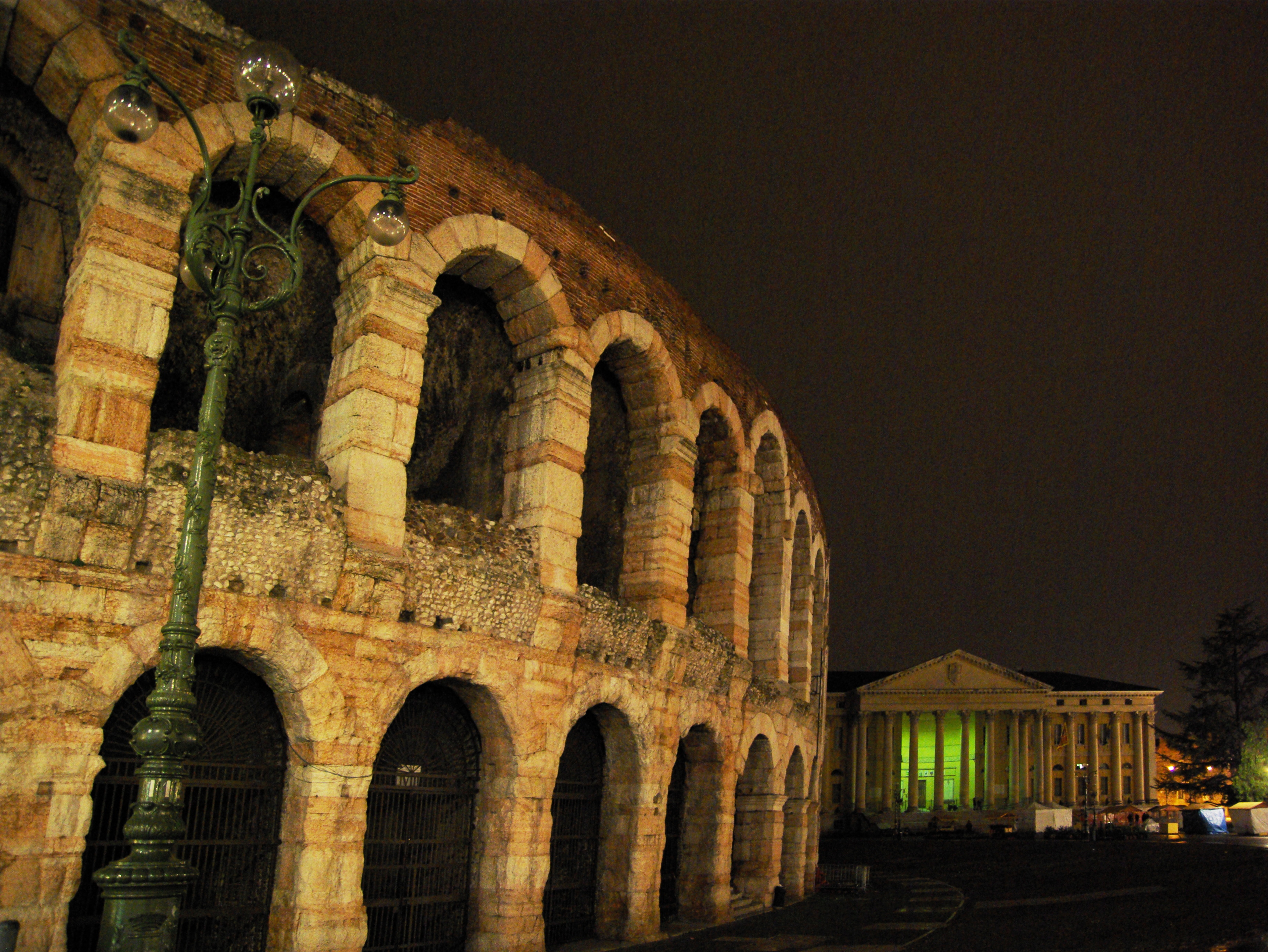 Ora della Terra Verona Piazza Bra Arena 2013 WWF Verona Paolo Villa. Fotocamera Pentax K10D, obbiettivo Tamron AF 17-50mm f2,8 XR Di II LD Aspherical [IF], risoluzione originale 10mp da file formato PEF